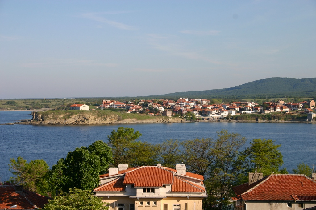 Tsarevo